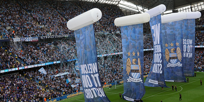 Etihad Stadium - Man City vs Chelsea 2015-16